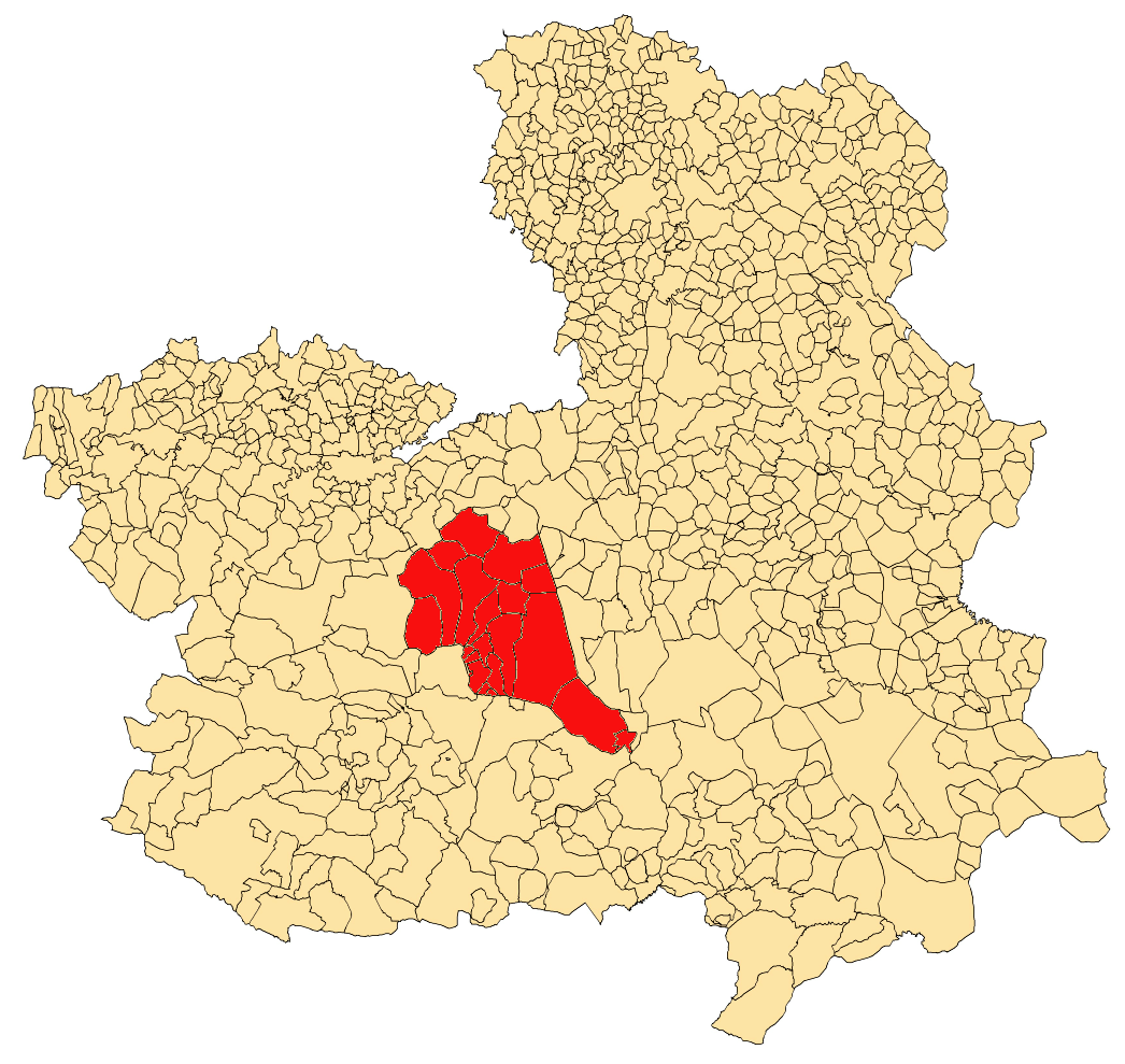 mapa de los territorios de la orden de san juan en castilla-la mancha.